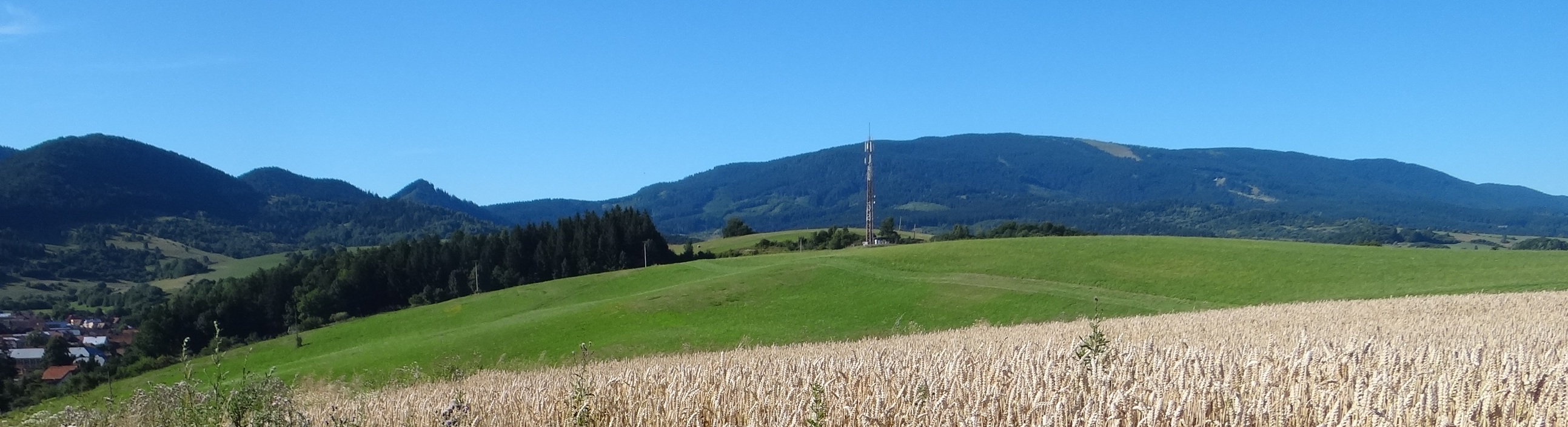 View from Istebné (Kubínska hoľa)